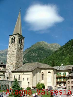 Alagna Valsesia - foto scattata da Fotogian (chi scrive) e concessa sotto